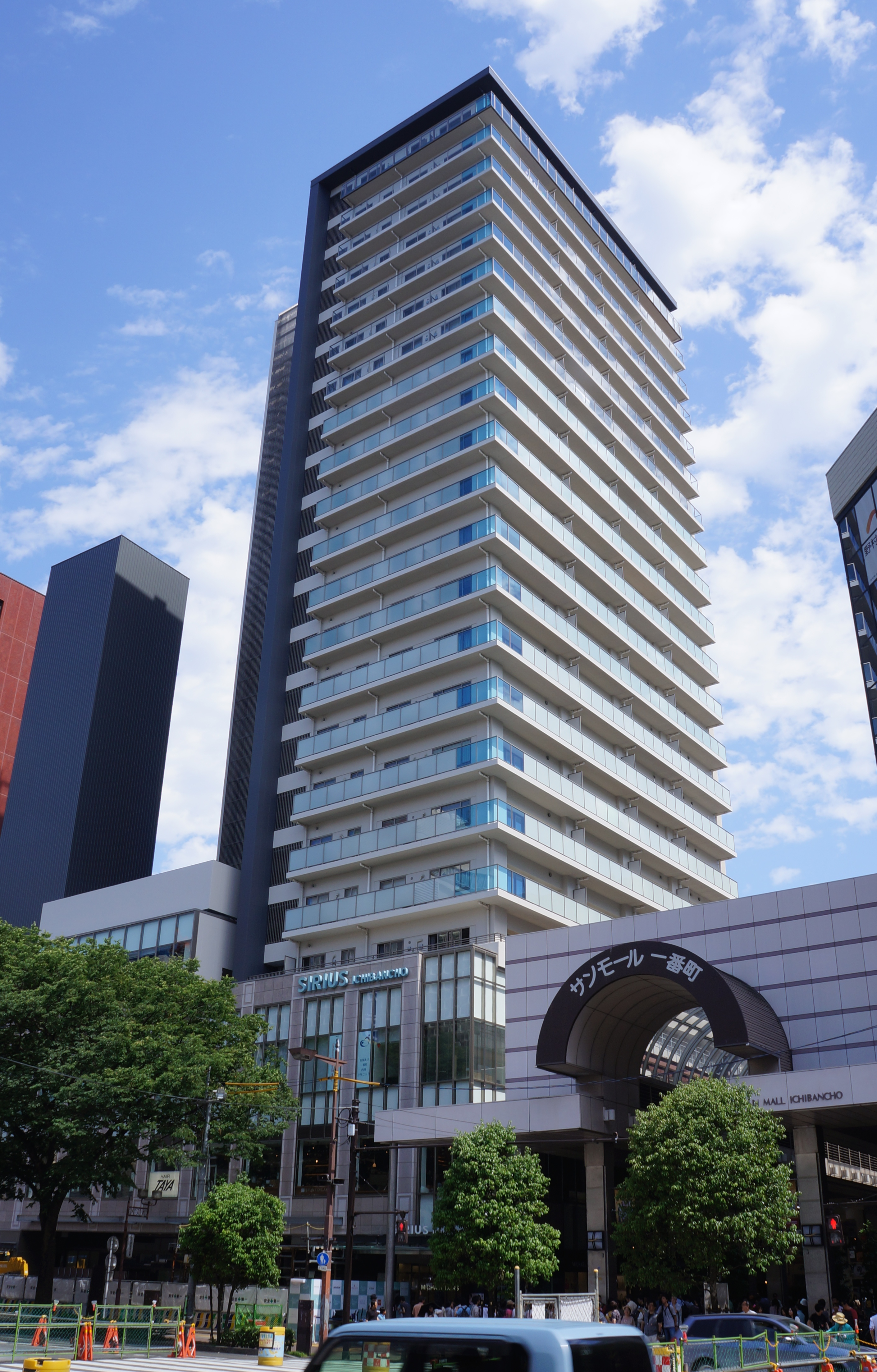 ザ 仙台タワー